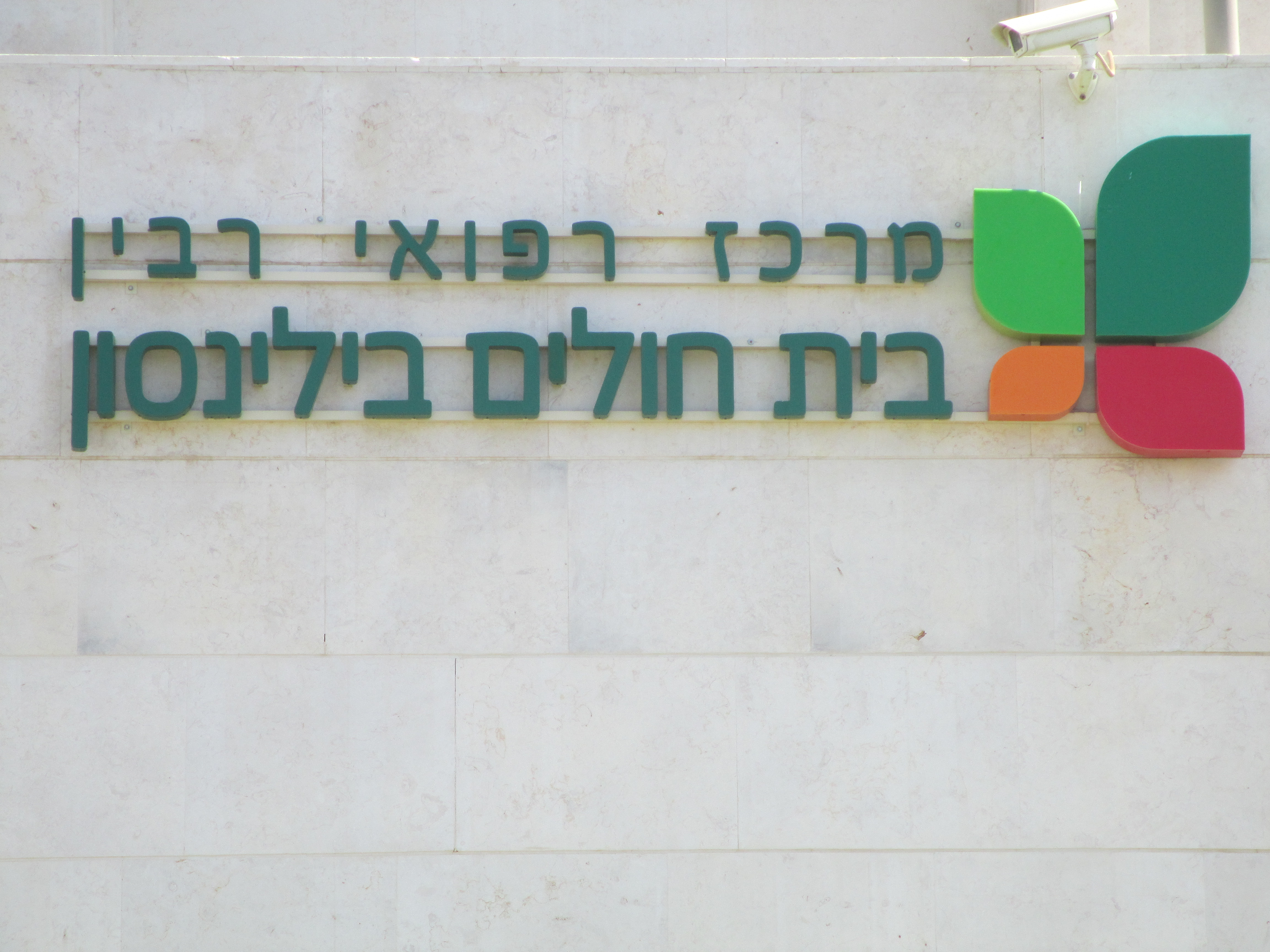 סמליל מרכז רפואי רבין - בי"ח בילינסון